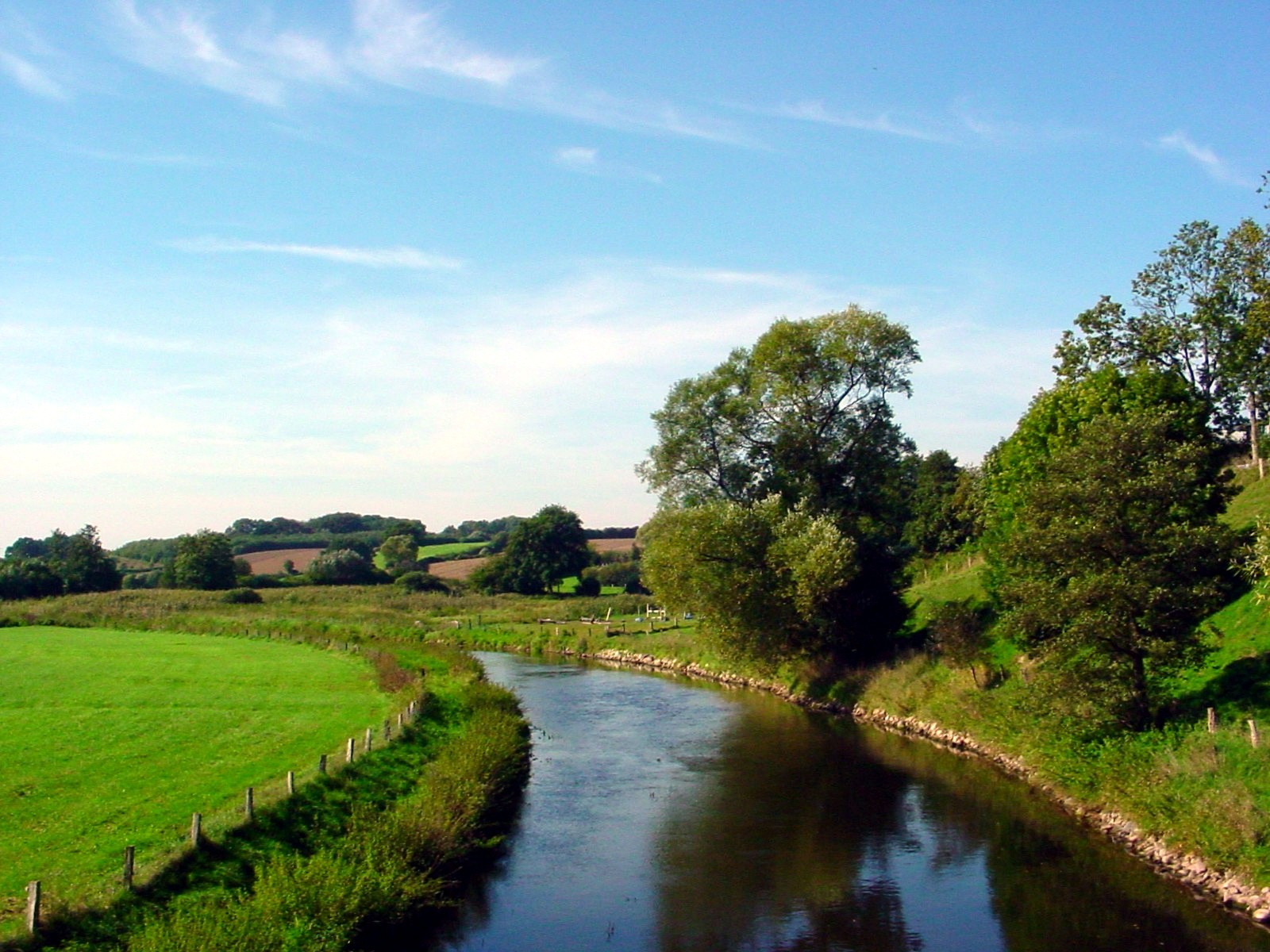 Trave bei Lokfeld/Stormarn / Trave river near Lokfeld/Stormarn